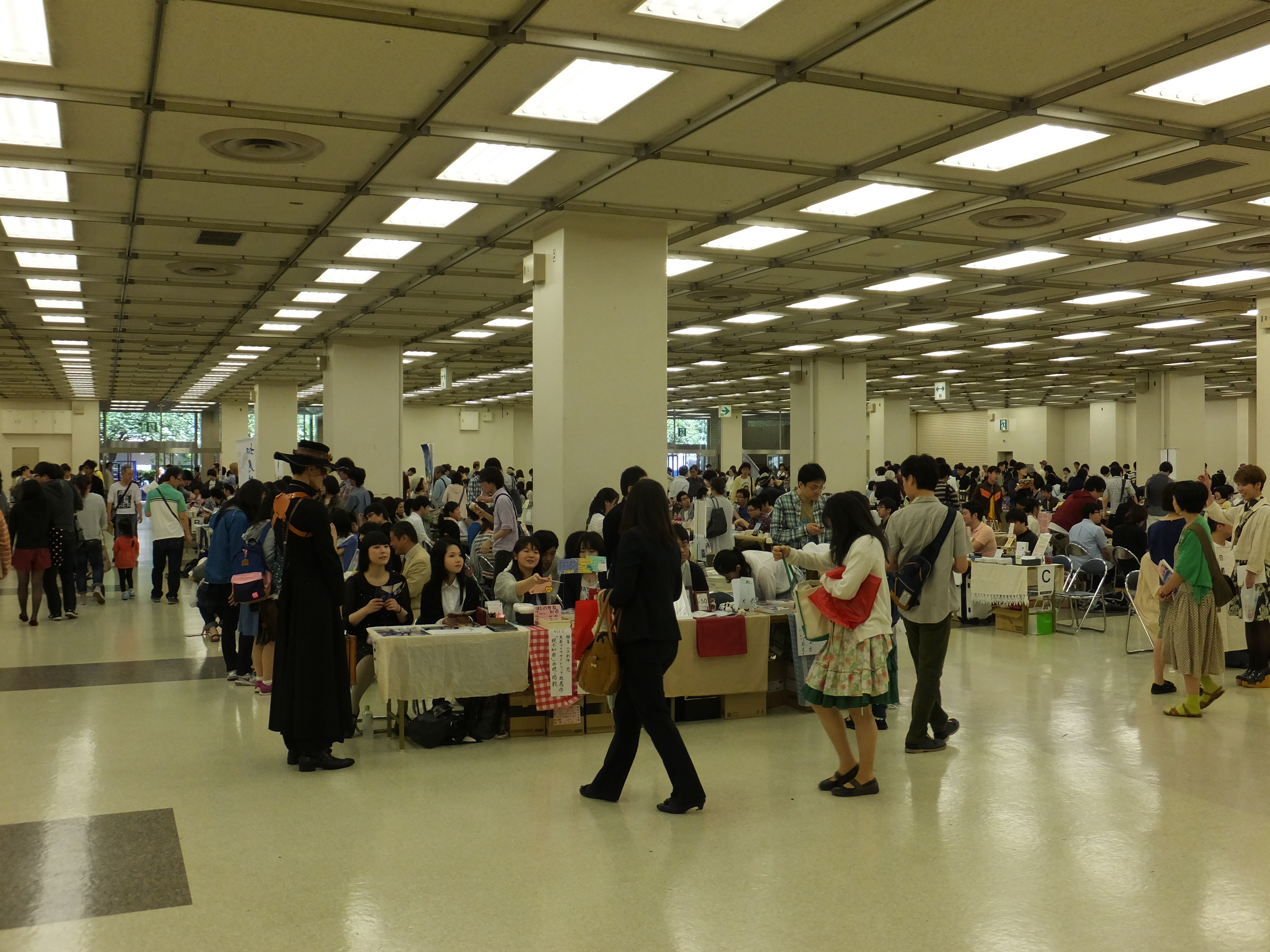 第20回文学フリマ東京の会場内の様子